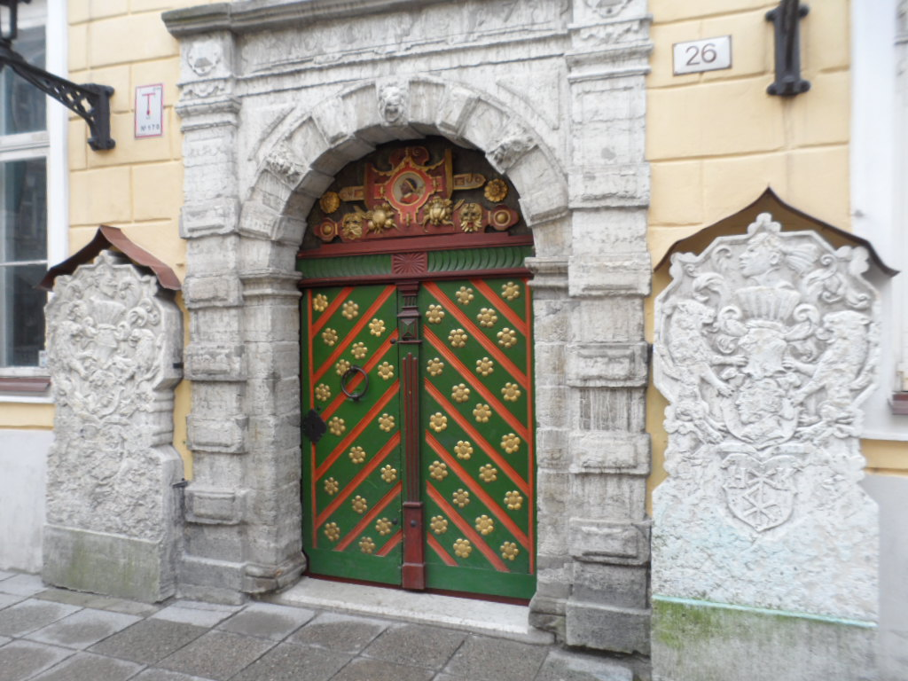 Портал и дверь Дома Черноголовых в Таллине